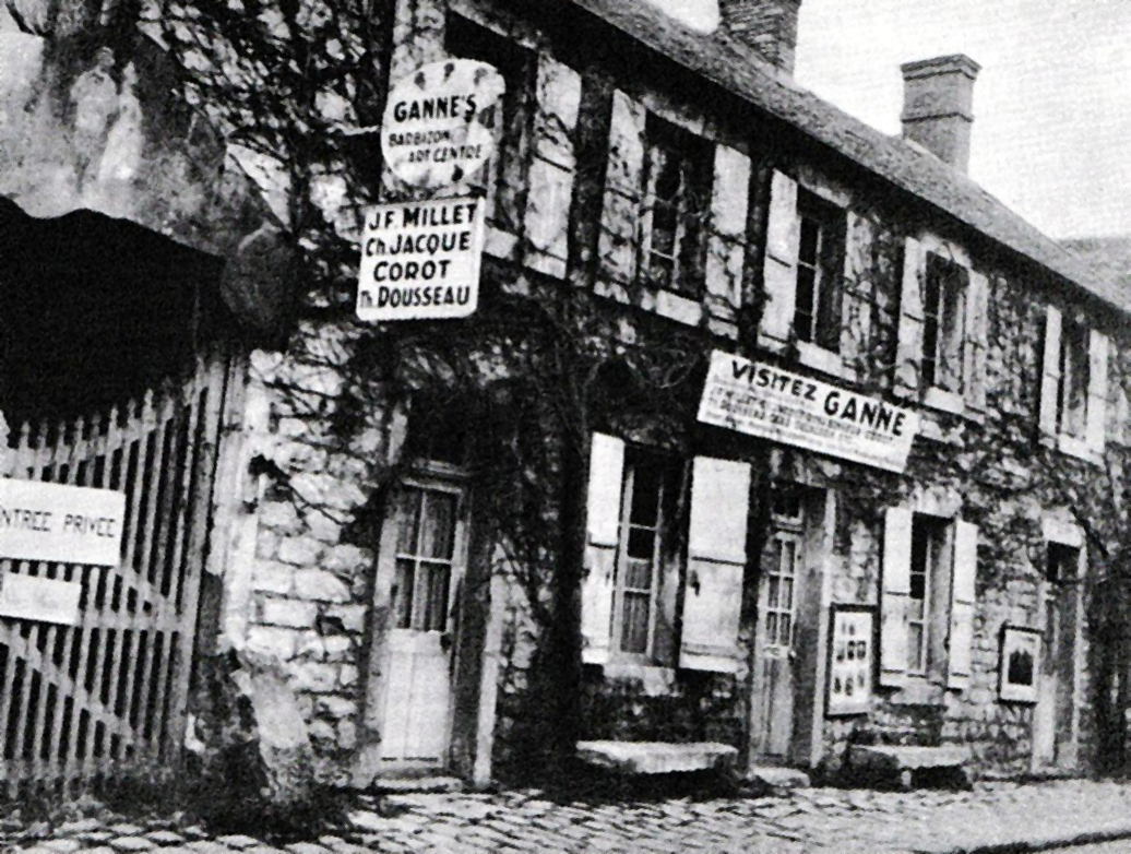 Pensiunea Ganne (Barbizon)